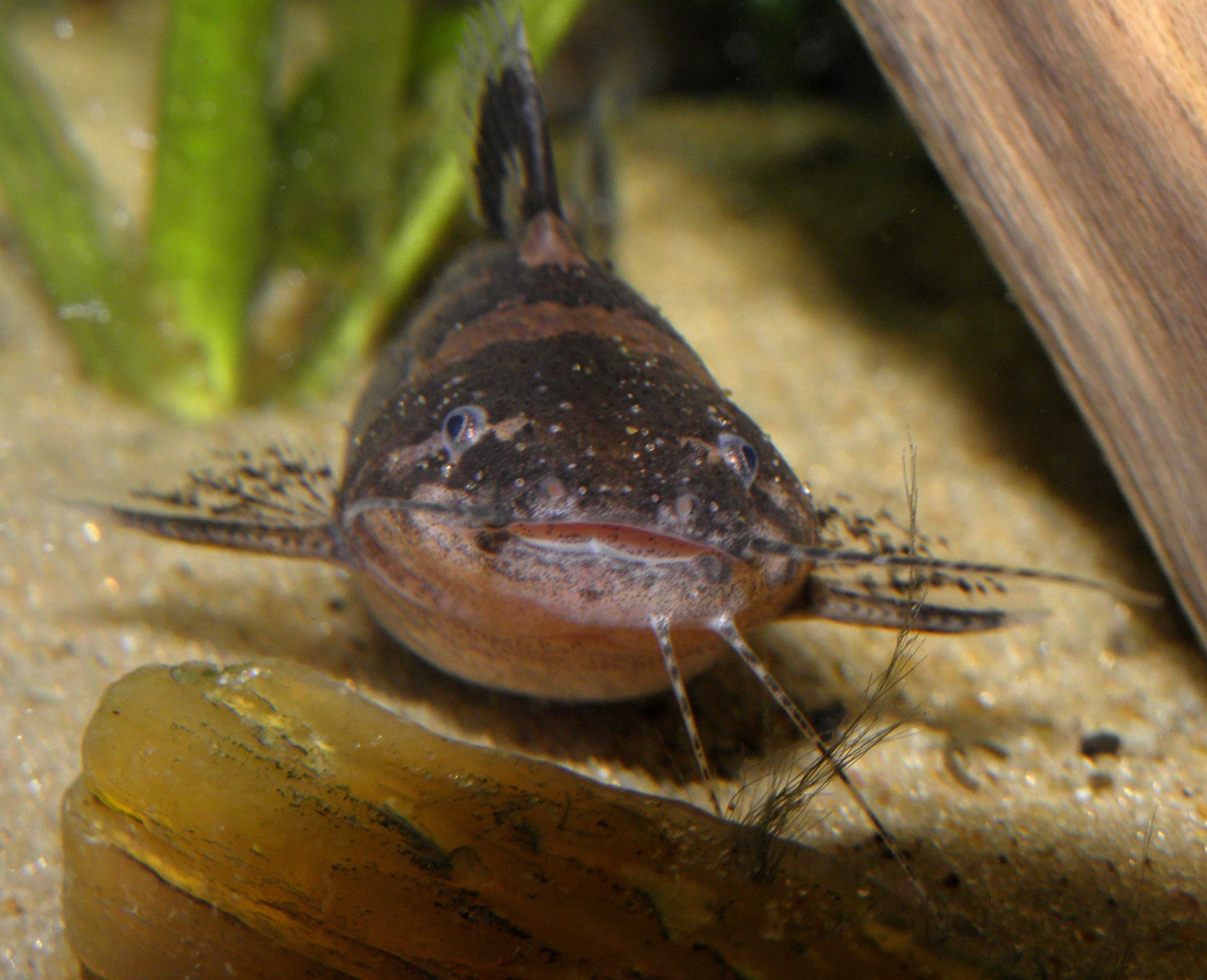 Un ejemplar perteneciente al género Microglanis, integrado por pequeños peces silúridos de agua dulce de la familia Pseudopimelodidae.